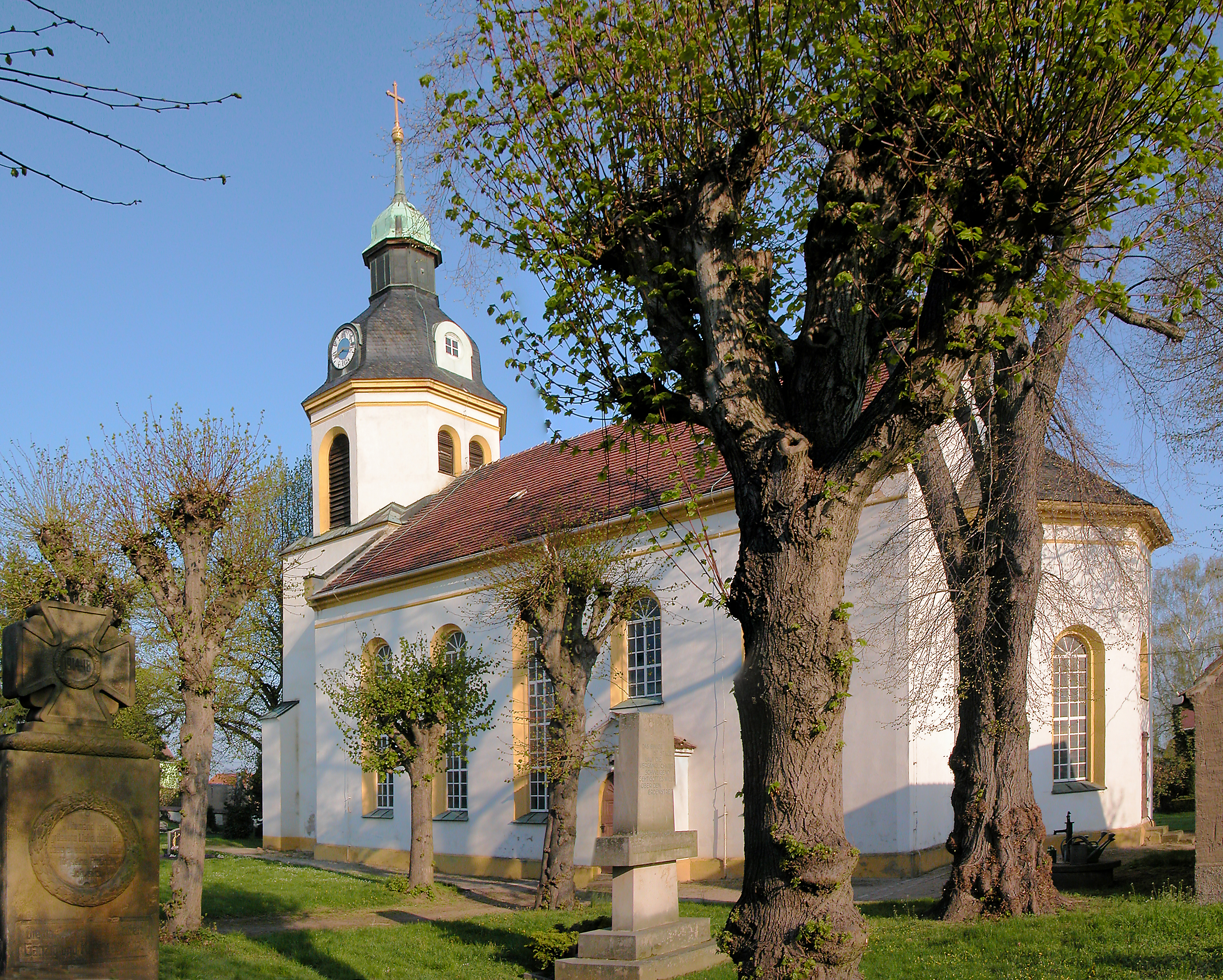 18.04.2011 04758 Ganzig (Liebschützberg): Evangelische Dorfkirche (GMP: 51.288522,13.183238) [DSCNn2237-2239.TIF]20110418010MDR.JPG(c)Blobelt